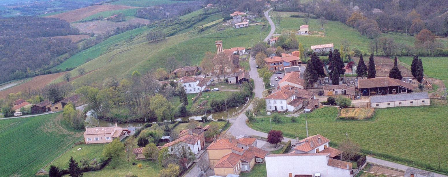 Vue aérienne de Lautignac prise en 2004